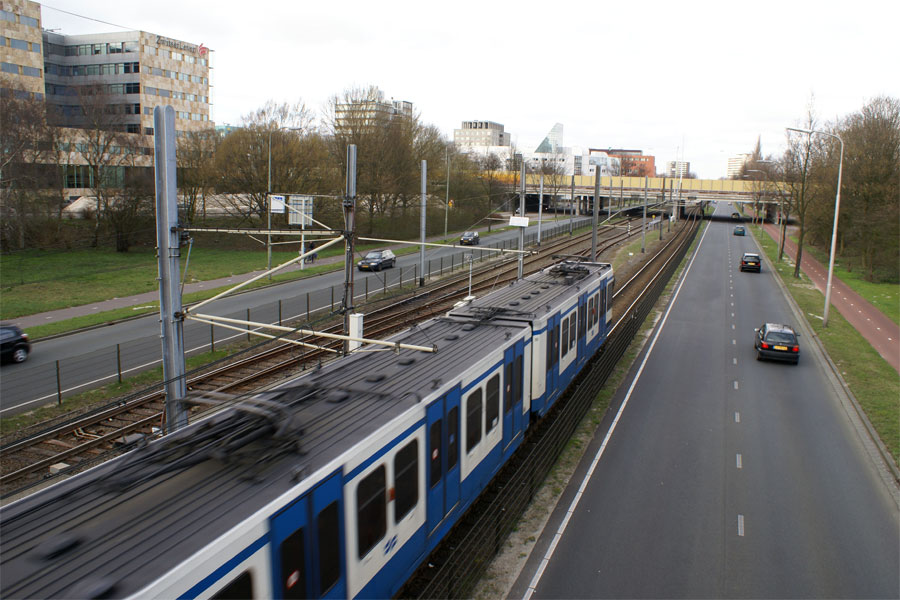 The Beneluxbaan road in Amstelveen (The Netherlands).